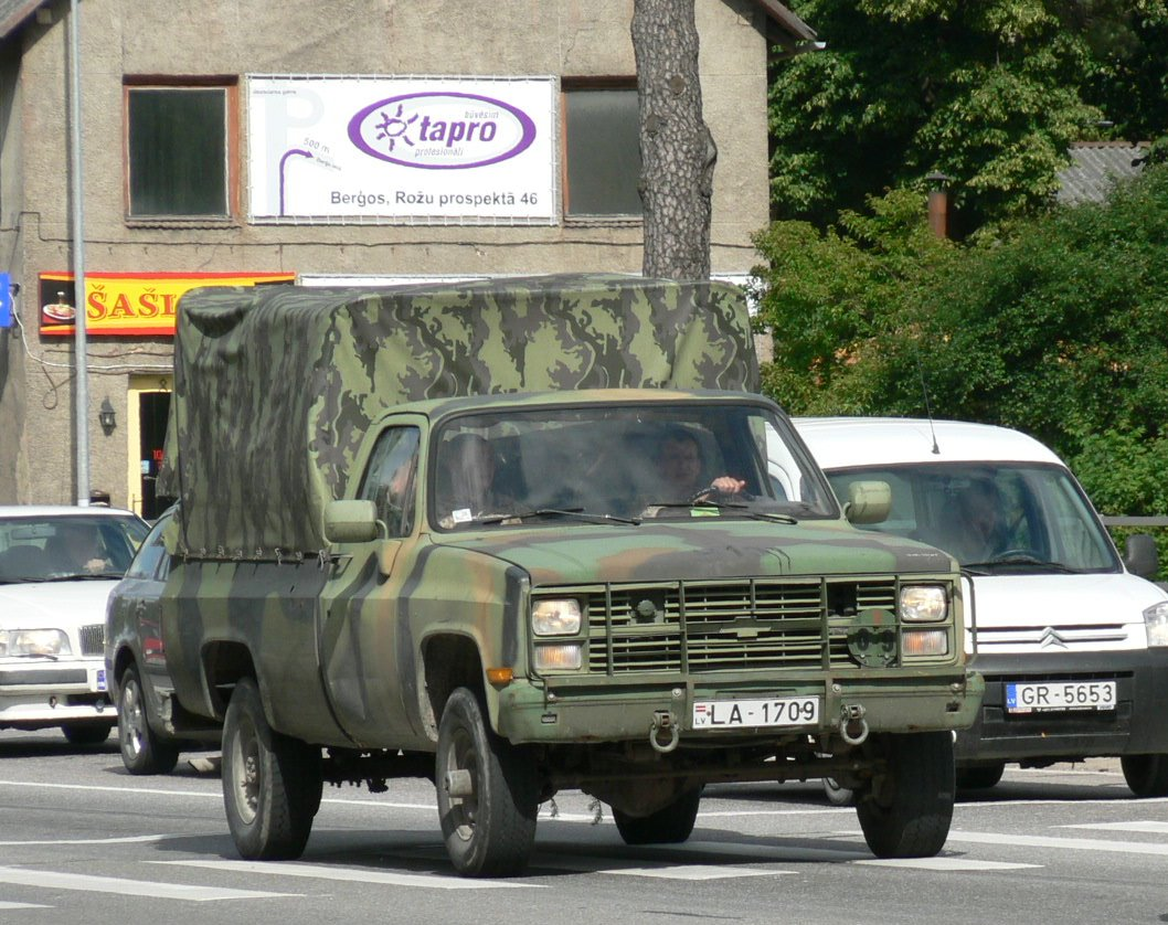 Беларуская (тарашкевіца): Лёккі грузавік chevrolet blazer M-1009 латвійскага войска, на вуліцы Рыгі.